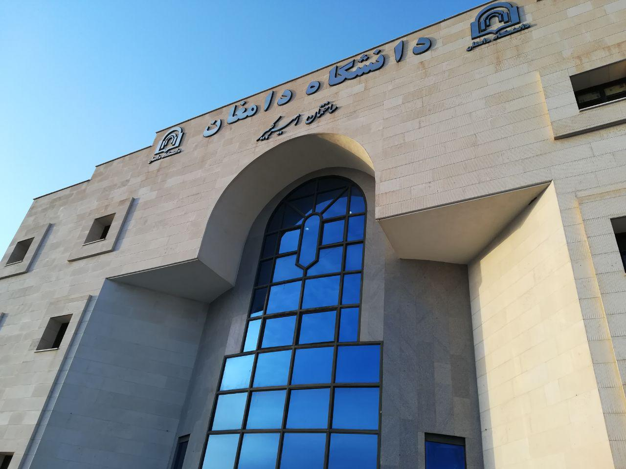 تصویر ساختمان امیرکبیر